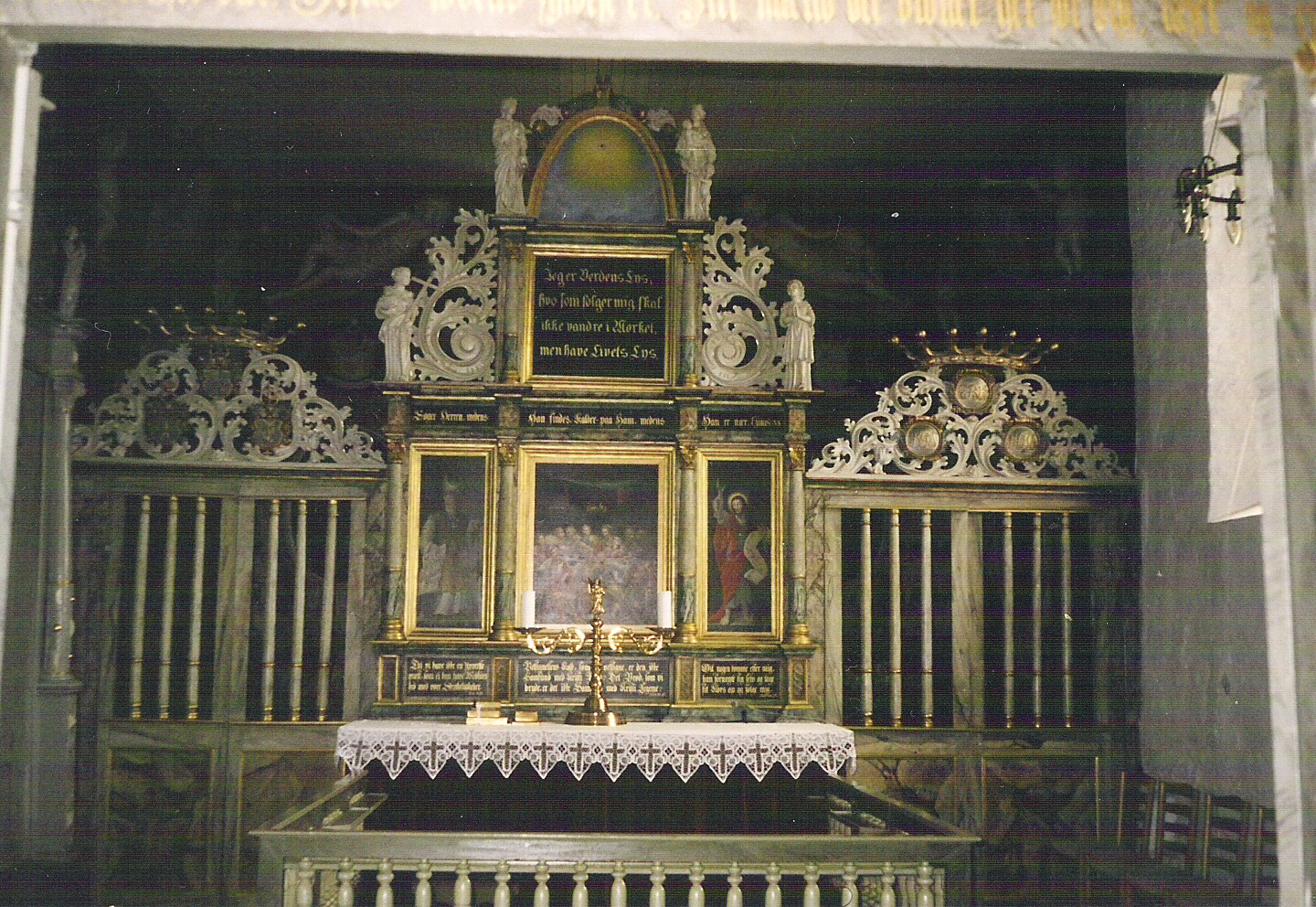 Feldballe Kirkes alter